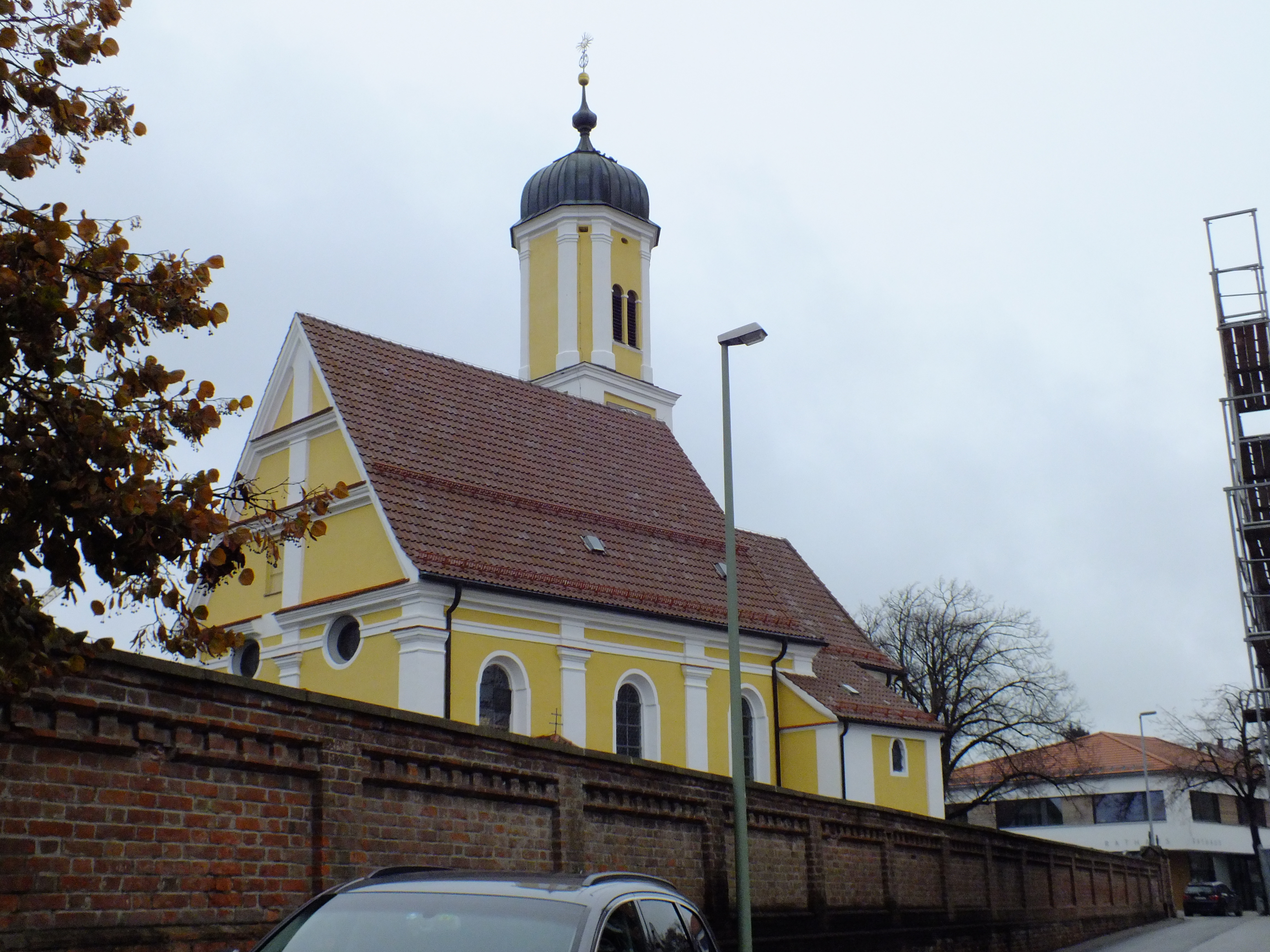 St. Vitus im oberschwäbischen Mauerstetten in Bayerisch/Schwaben